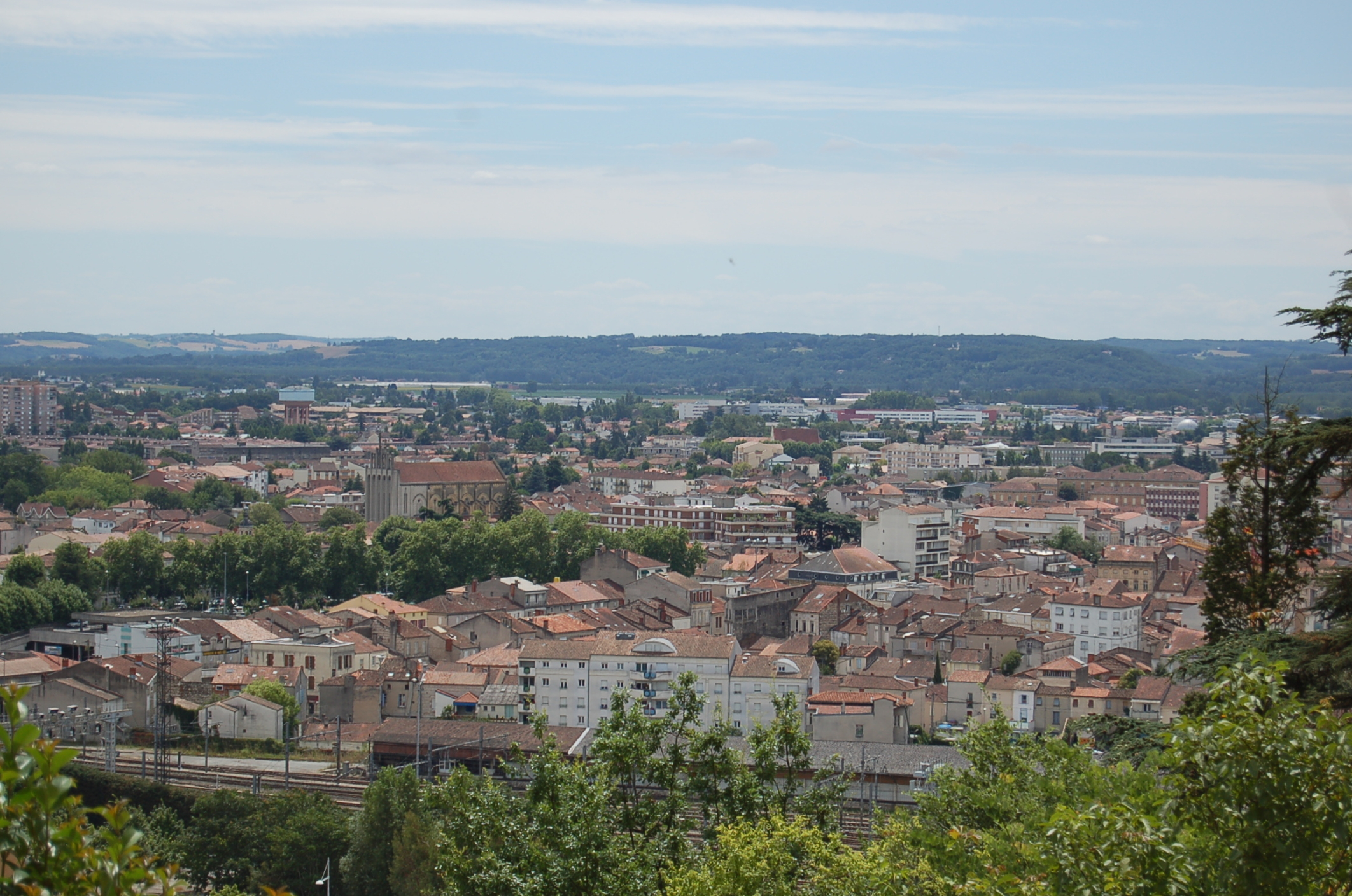 Vue depuis les hauteurs d'Agen